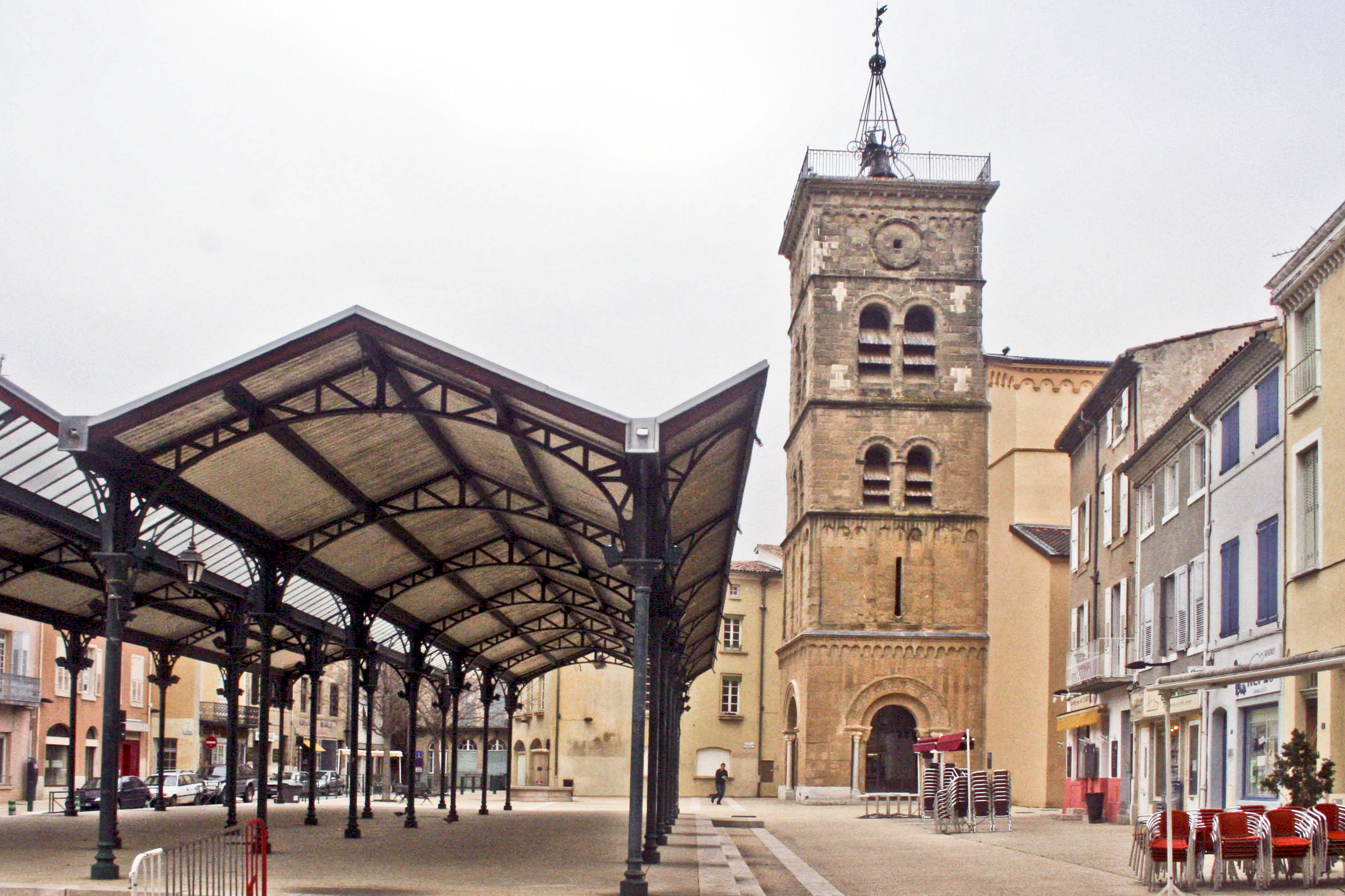 Église Saint-Jean et halle, Valence, Drôme, France